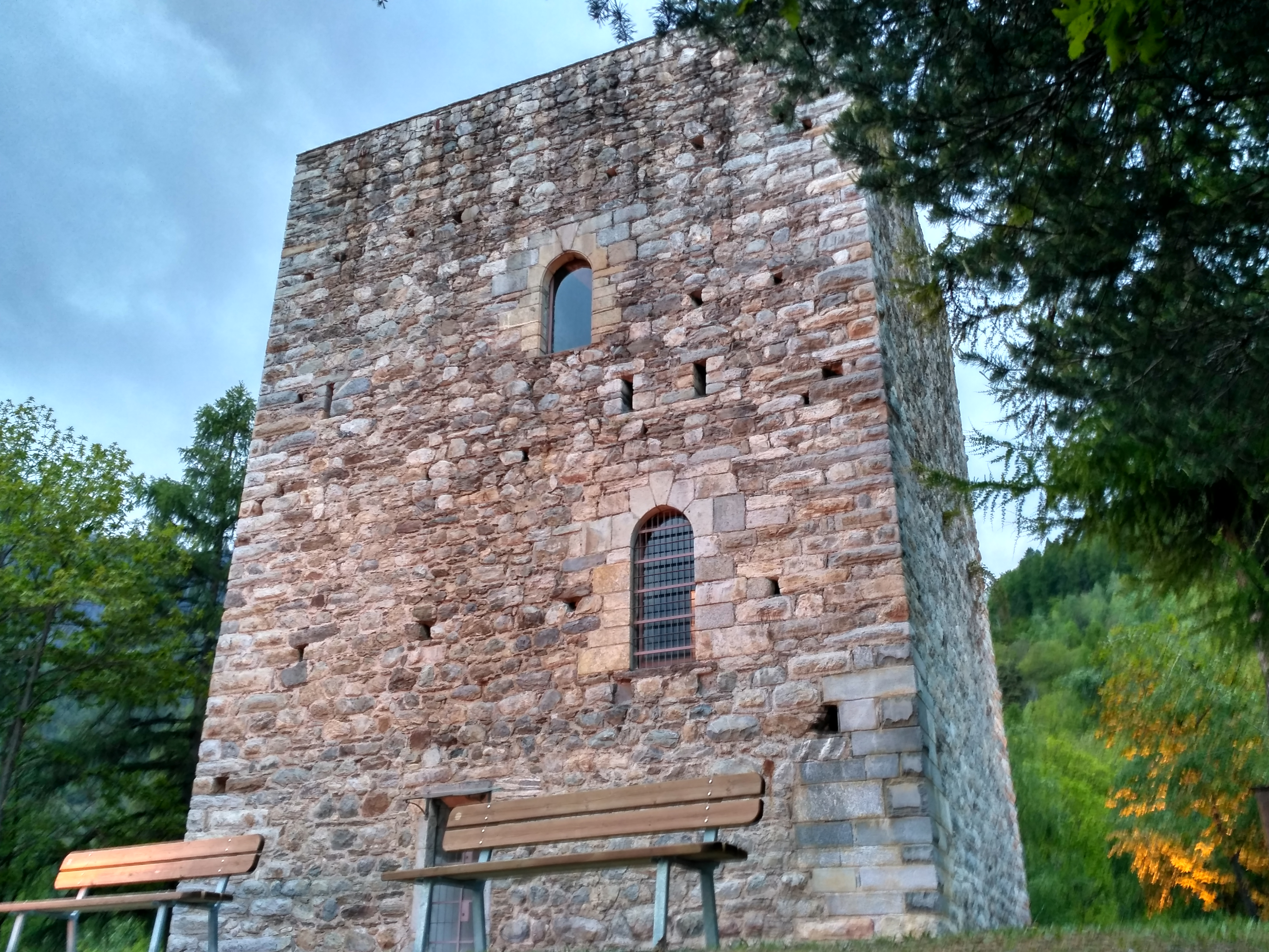 Torre di Roncisvalle a Castionetto di Chiuro Sondrio Italia